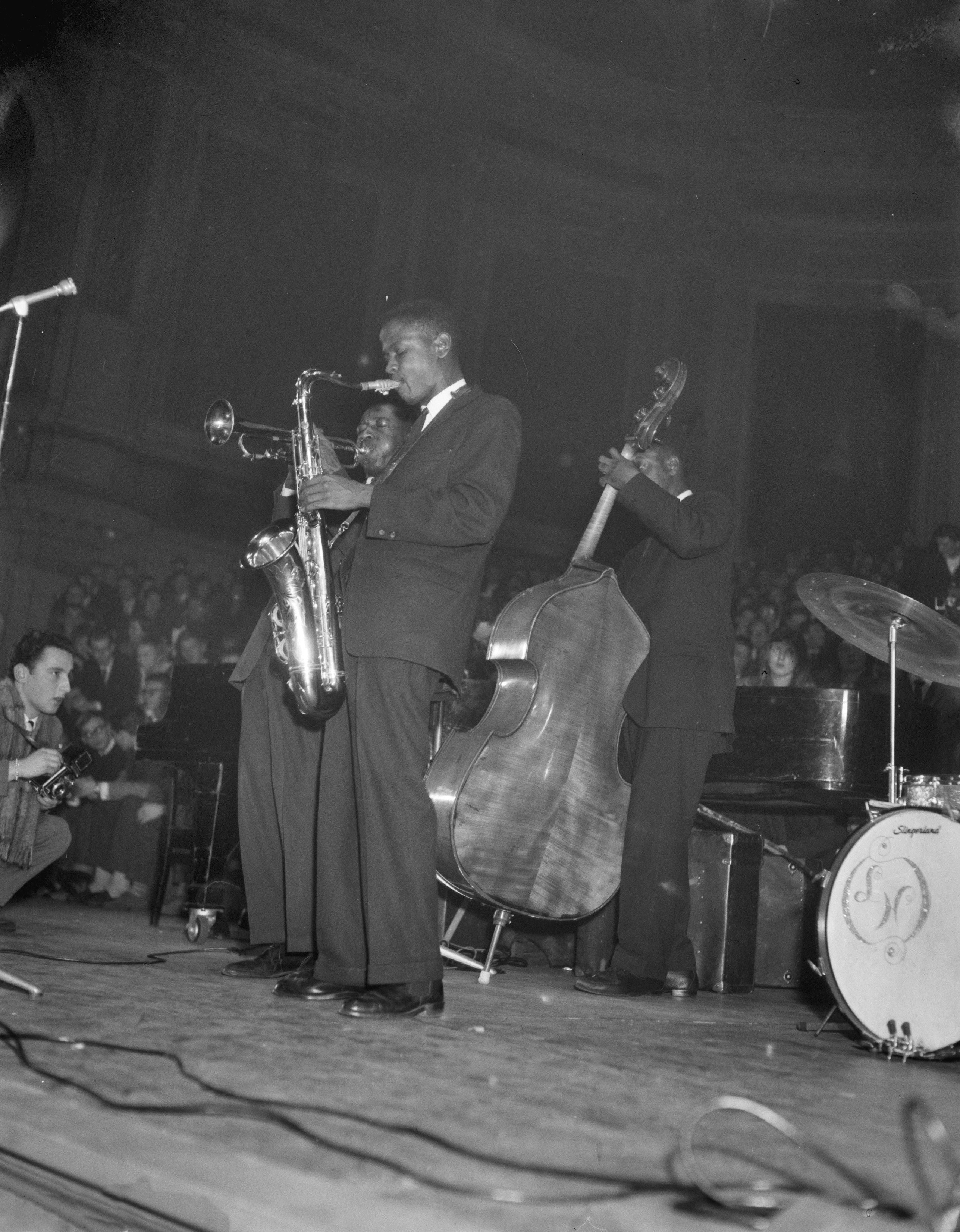 Collectie / Archief : Fotocollectie Anefo Reportage / Serie : [ onbekend ] Beschrijving : Nachtconcert van het Horace Silver quintet in het concertgebouw te Amsterdam. Blue Mitchell (trumpet), Junior Cook (tenor saxophone), Calvin (Gene) Taylor (bass) Datum : 21 februari 1959 Locatie : Amsterdam, Noord-Holland Trefwoorden : Nachtconcerten Persoonsnaam : Horeca Silverquintet Fotograaf : Rossem, Wim van / Anefo Auteursrechthebbende : Nationaal Archief Materiaalsoort : Negatief (zwart/wit) Nummer archiefinventaris : bekijk toegang 2.24.01.04 Bestanddeelnummer : 910-1689